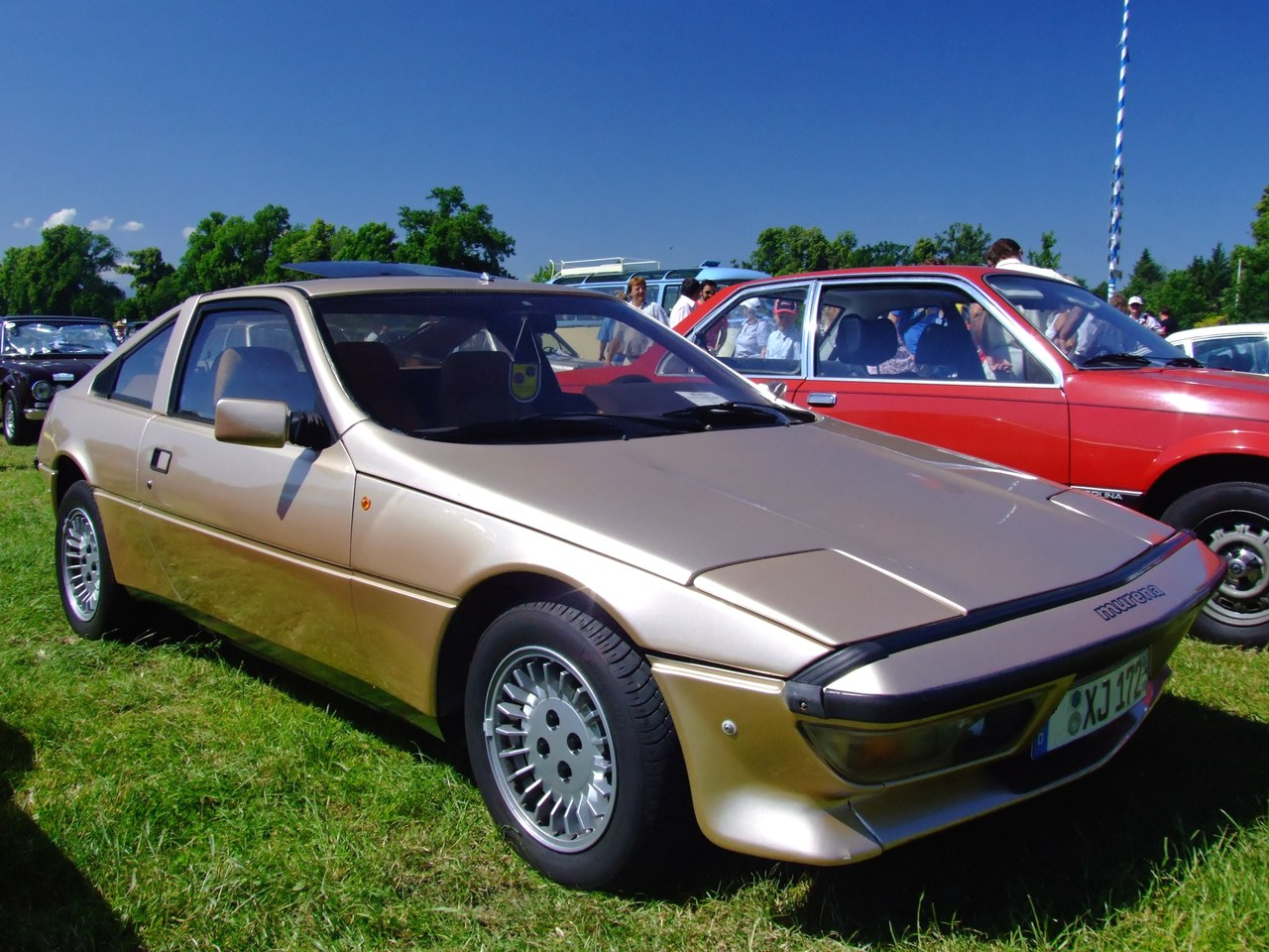 Quelle: selbst fotografiert, 06/2007 Fotograf: Späth Chr.